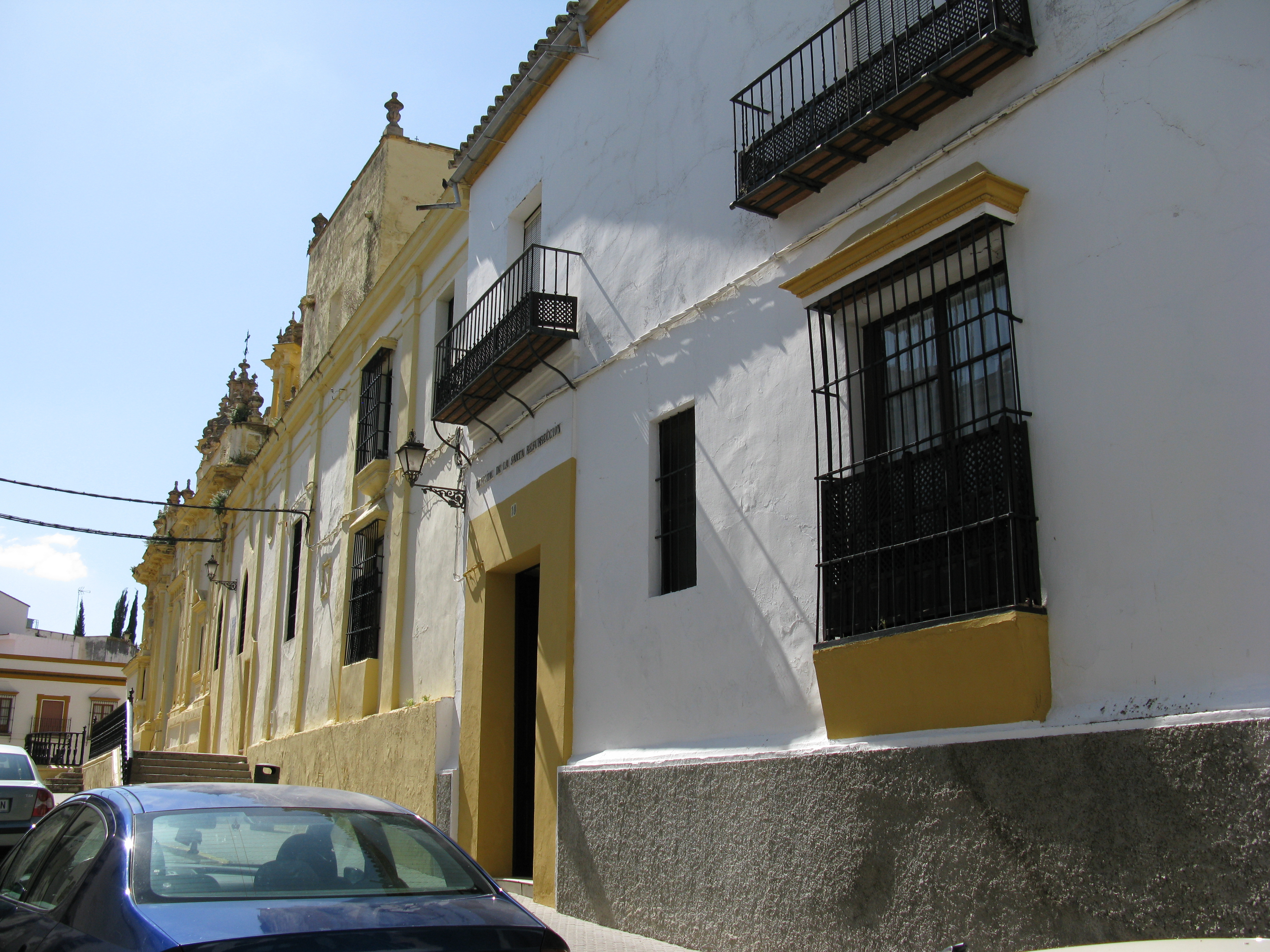 Hospital de la Santa Resurrección, en Utrera (Sevilla), España.